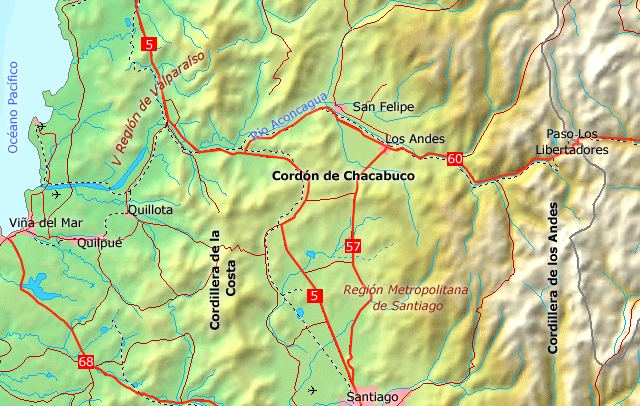 Mapa del cordón de Chacabuco y sus alrededores